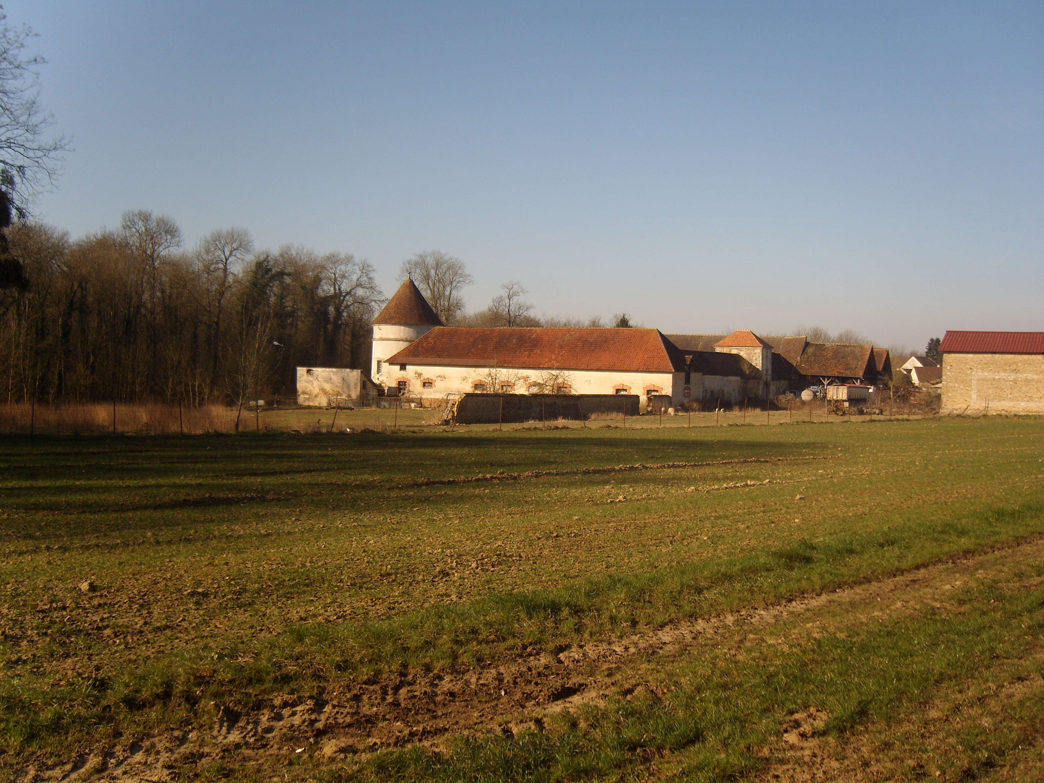 La ferme de Sourdeau à Fontenay-Trésigny